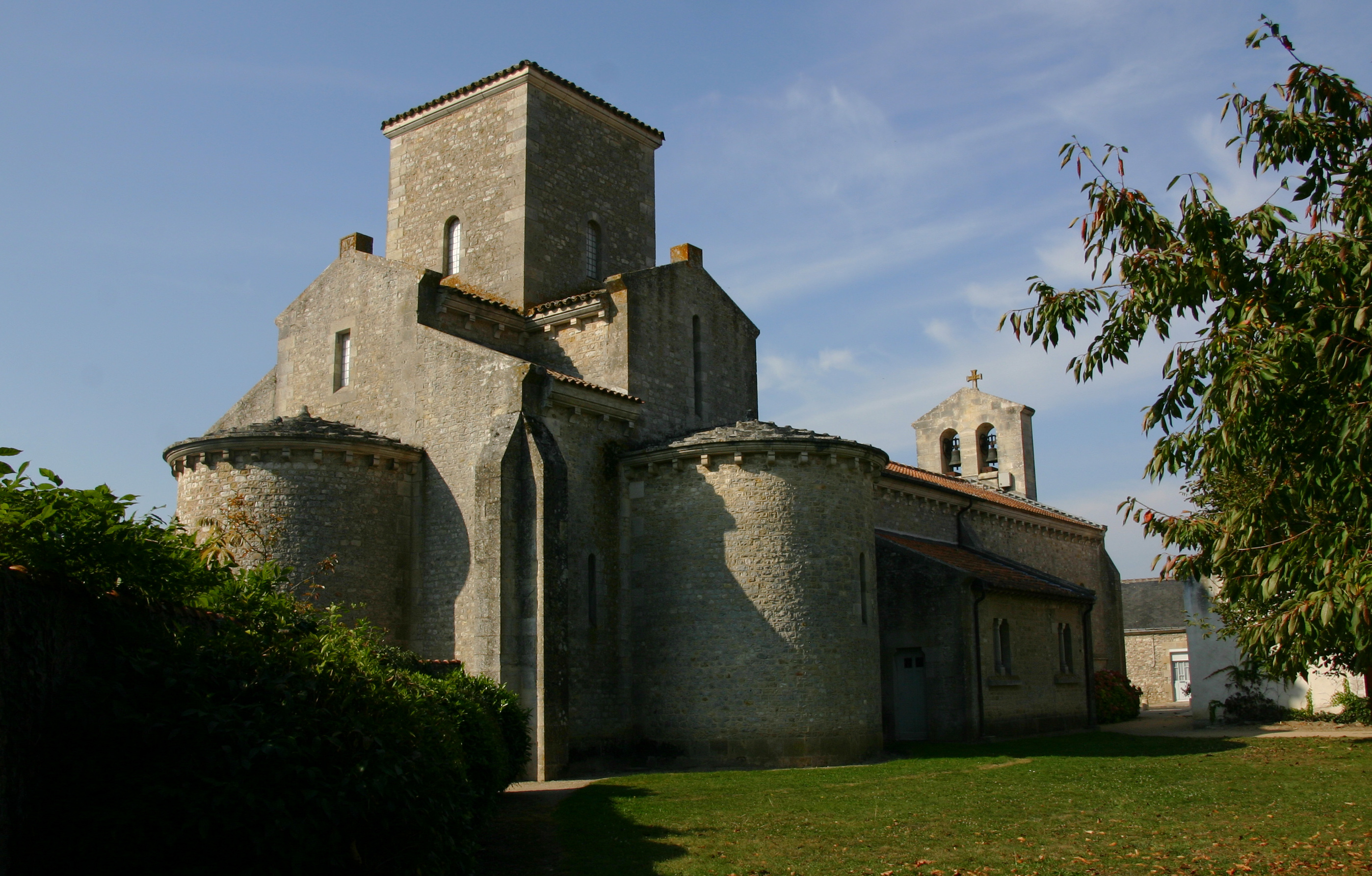 Kirche von Germigny-des-Prés im Loiret (Region Centre-Val de Loire).